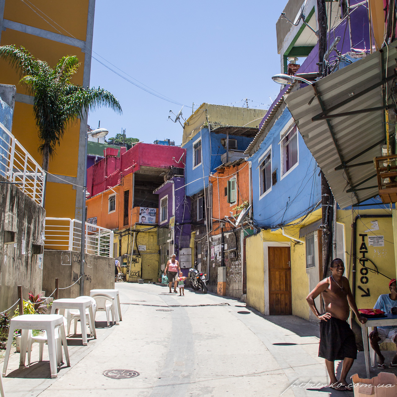 Rocinha, Rio de Janeiro - State of Rio de Janeiro, Brazil